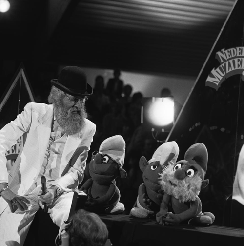 Vader Abraham, 'Nederland Muziekland'